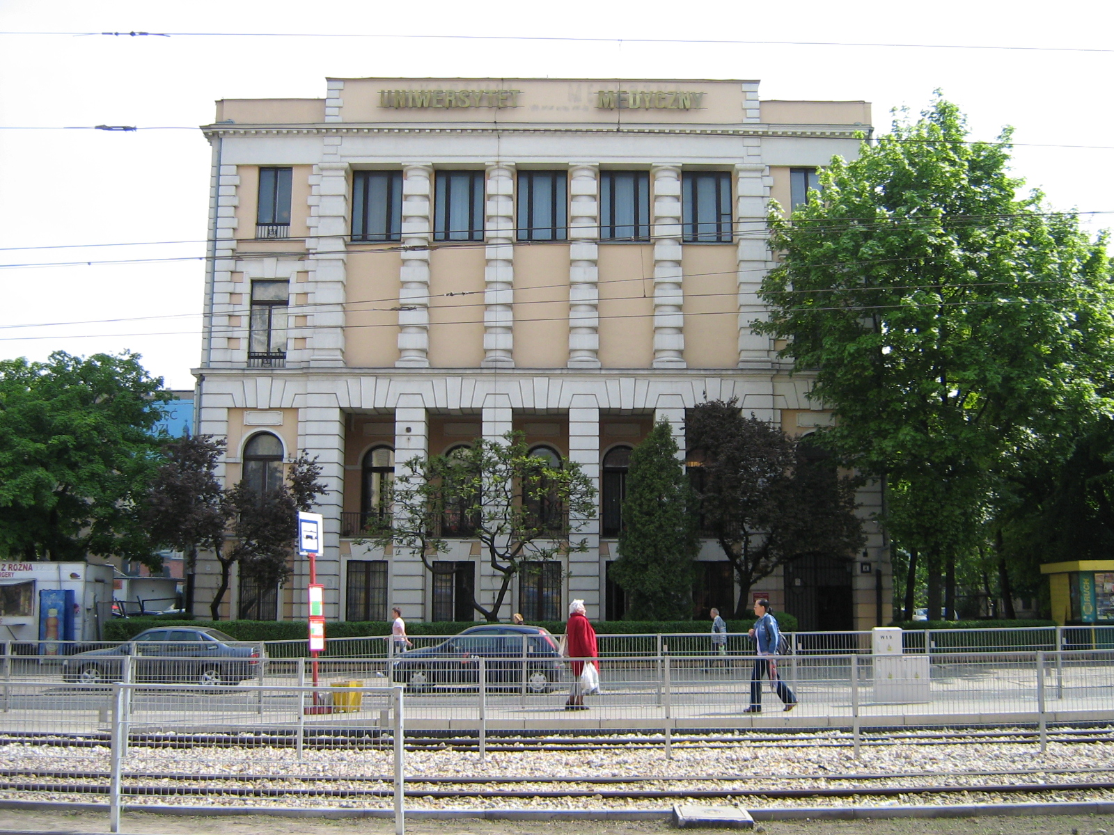 Pałac Jakuba Hertza w Łodzi